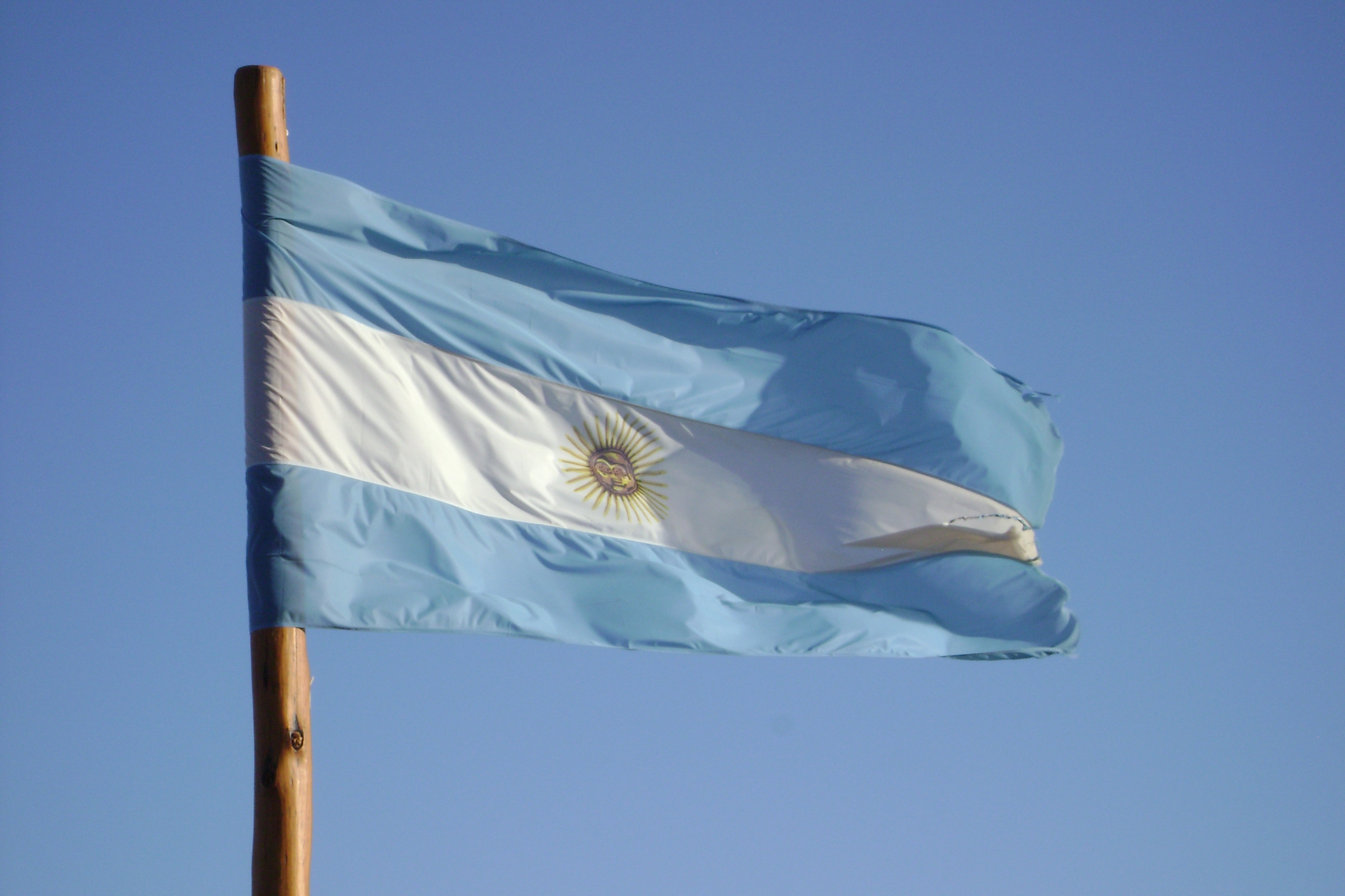 BANDERA DE LA REPÚBLICA ARGENTINA. ORACIÓN A LA BANDERA: Bandera de la Patria, celeste y blanca, símbolo de la unión y la fuerza con que nuestros padres nos dieron independencia y libertad; guía de la victoria en la guerra y del trabajo y la cultura en la paz. Vínculo sagrado e indisoluble entre las generaciones pasadas, presentes y futuras. Juremos defenderla hasta morir antes que verla humillada. Que flote con honor y gloria al frente de nuestras fortalezas, ejércitos y buques y en todo tiempo y lugar de la tierra donde ellos la condujeren. Que a su sombra la Nación Argentina acreciente su grandeza por siglos y siglos y sea para todos los hombres mensajera de libertad, signo de civilización y garantía de justicia. Autor: Joaquín V. González